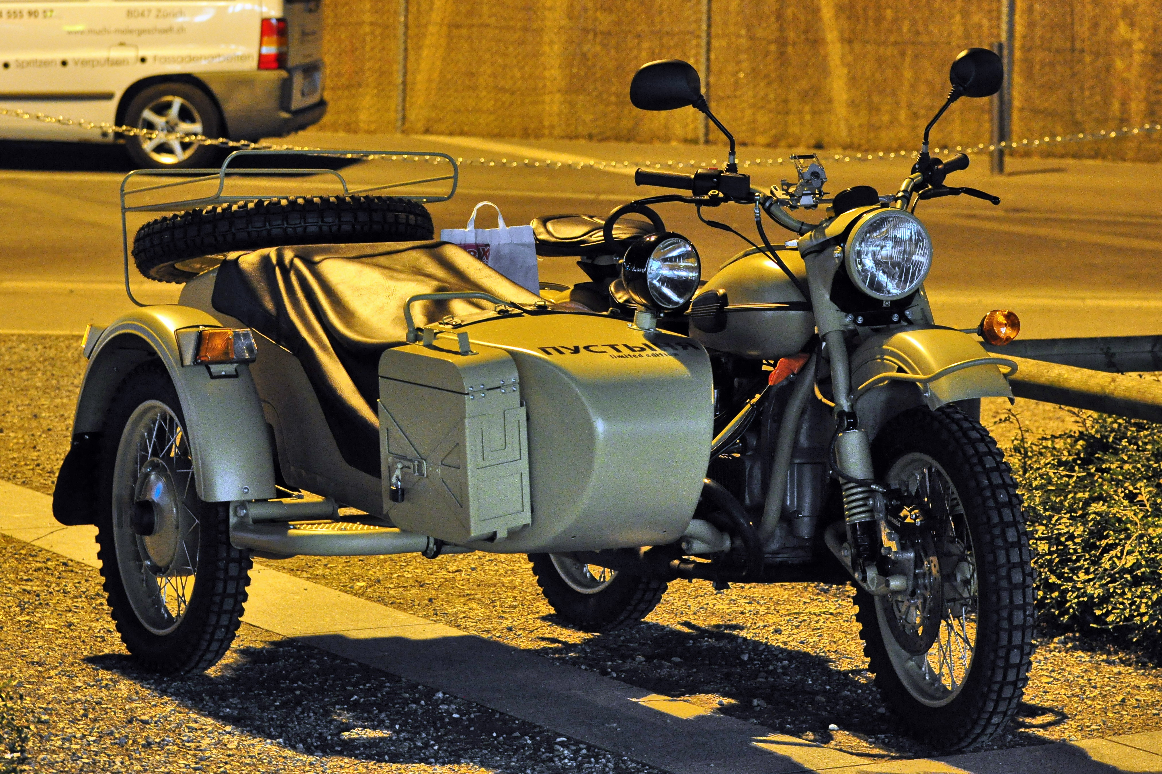 IMZ-Ural (?) in Zürich-Oerlikon (Zürich-Nord, Switzerland)